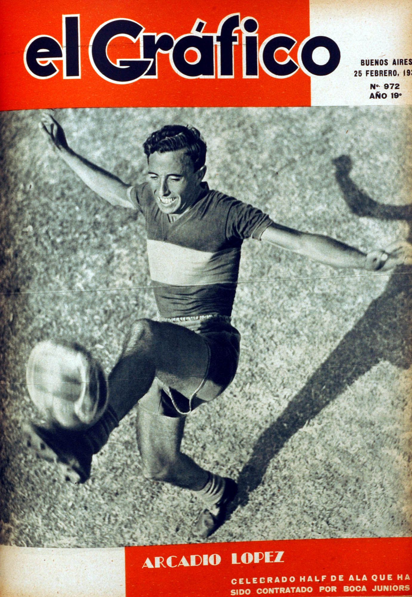 El Grafico del 25 de Febrero de 1938. Edicion 972